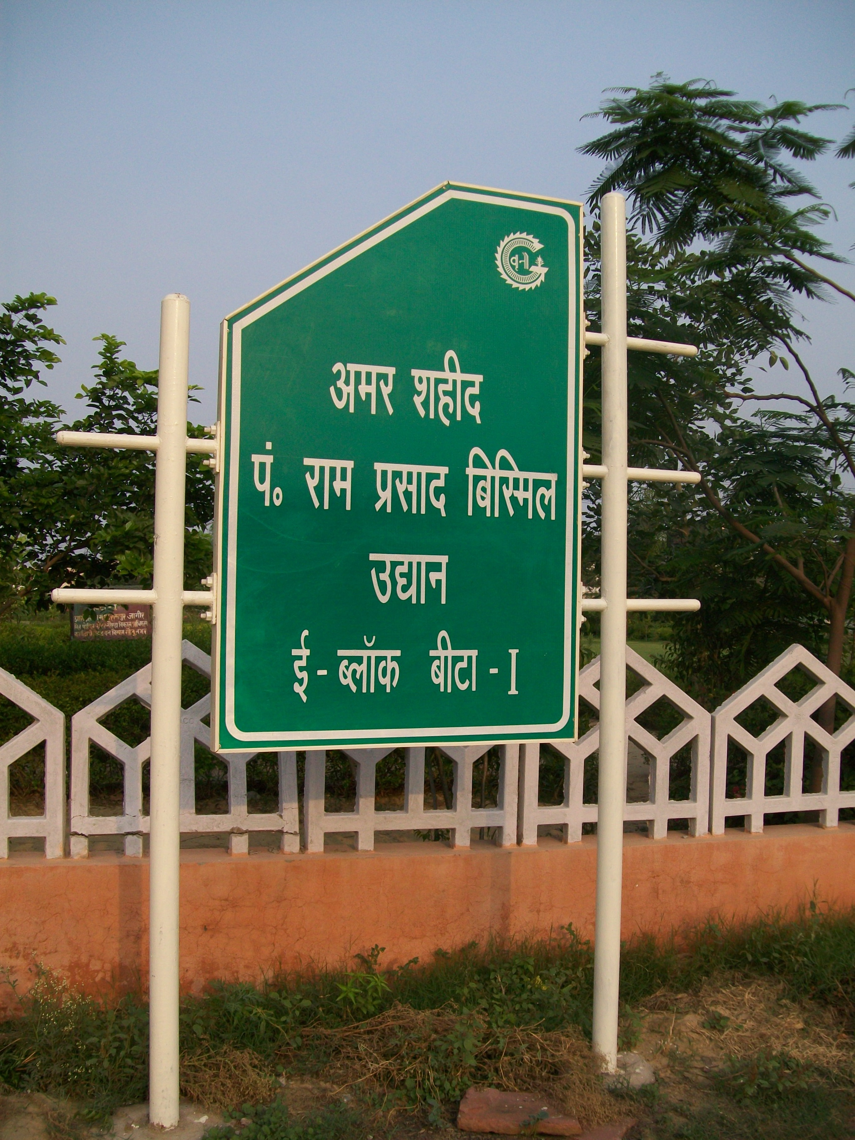 ग्रेटर नोएडा के बीटा वन सेक्टर स्थित रामपुर जागीर गाँव में अमर शहीद पण्डित राम प्रसाद बिस्मिल उद्यान[6] का फोटो